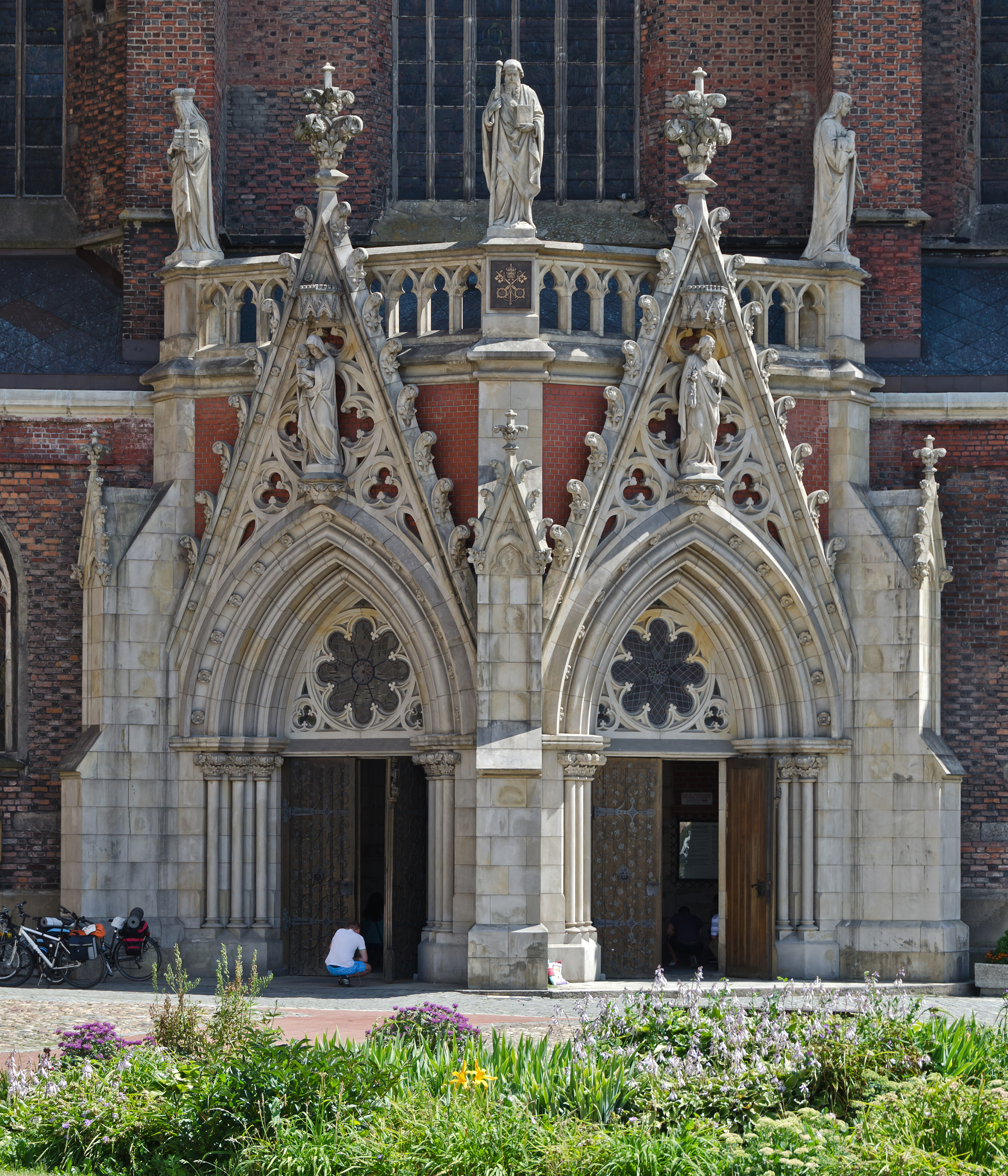 Nysa, kościół par. p.w. św. Jakuba Starszego i św. Agnieszki, 1430, XIX, po 1945